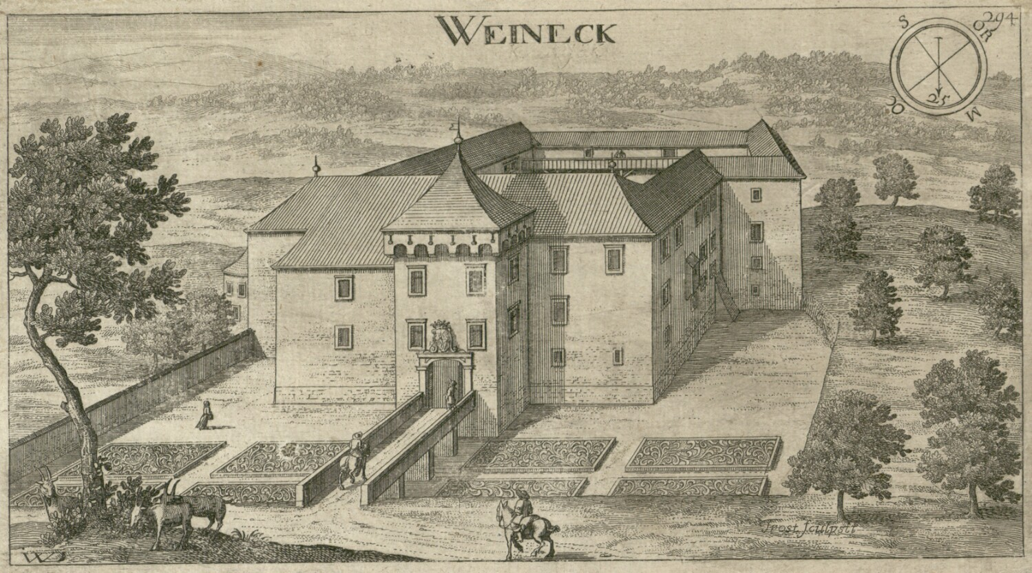 Dvorec Kravjek